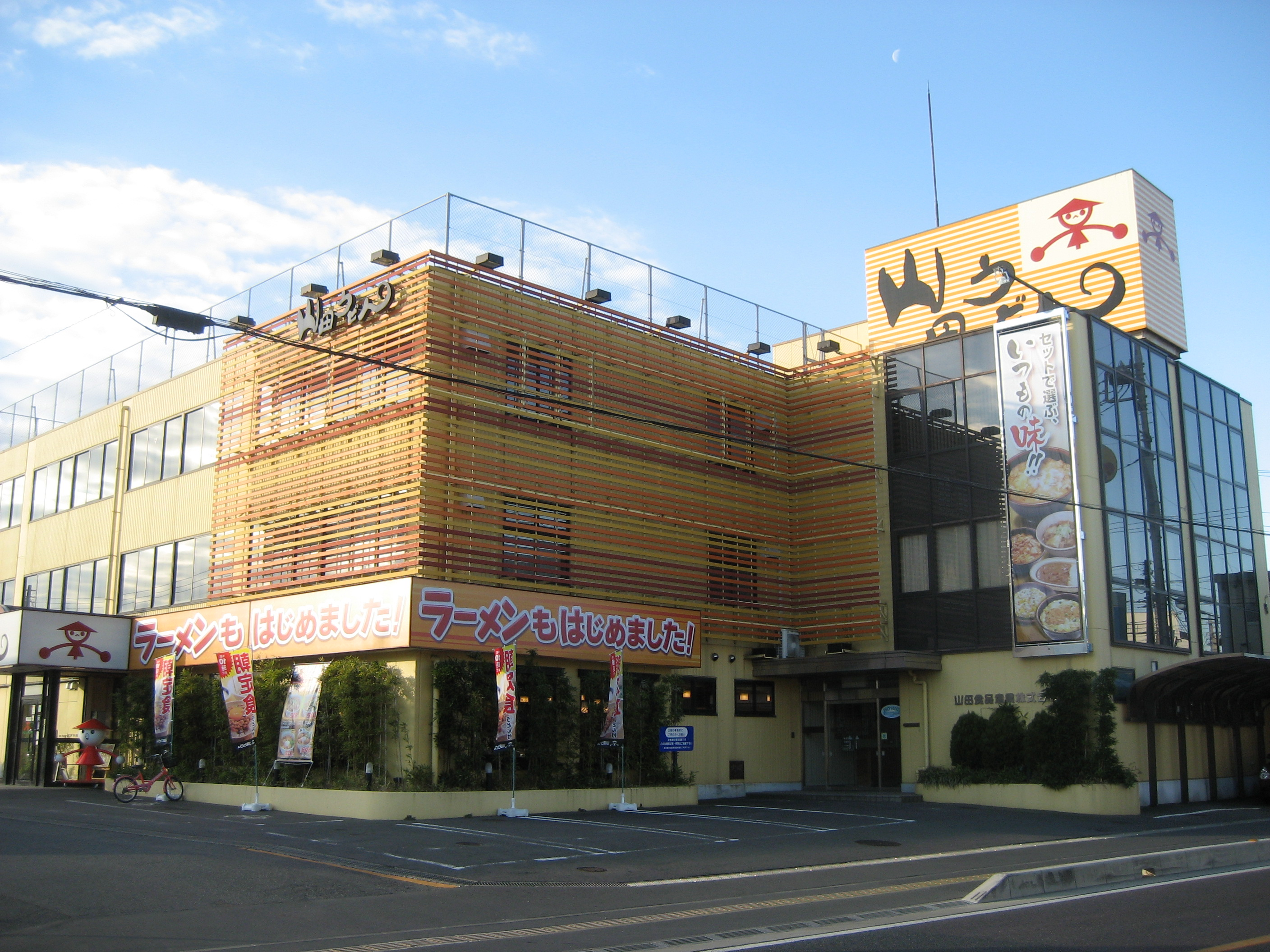 埼玉県所沢市にある 山田うどん本社社屋